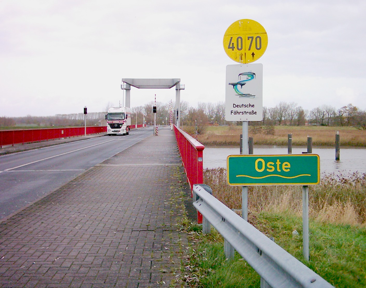 Deutsche Fährstraße im Verlauf der Landstraße 111, Geversdorf an der Oste in Niedersachsen. Siehe auch Image:Geversdorf Deutsche Fährstraße 013.jpg